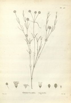 Novæ Hollandiæ plantarum specimen /. Parisiis :Ex typographia Dominæ Huzard,1804-1806..